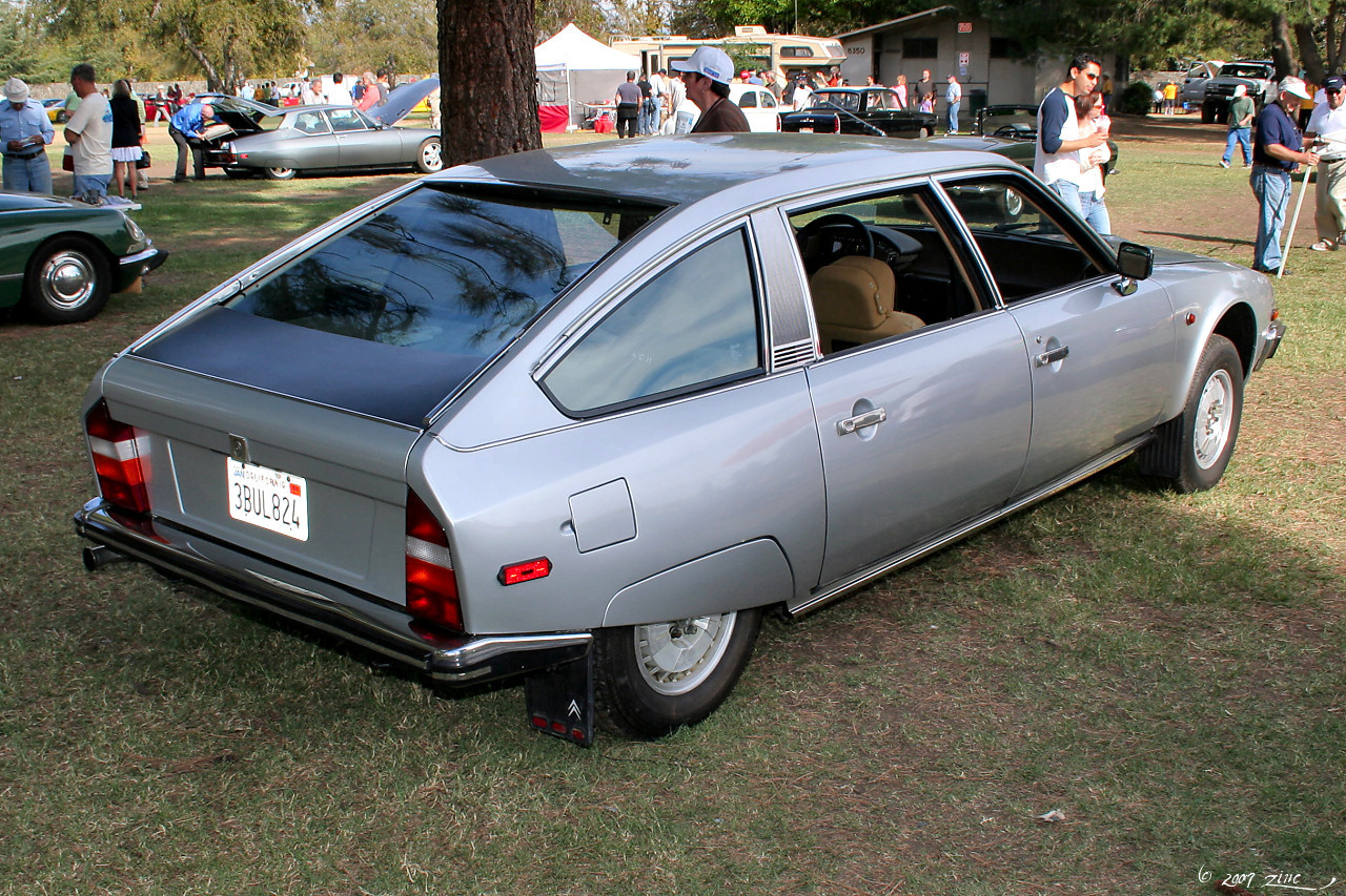 1982 Citroen CX Prestige - silver - rvr-1